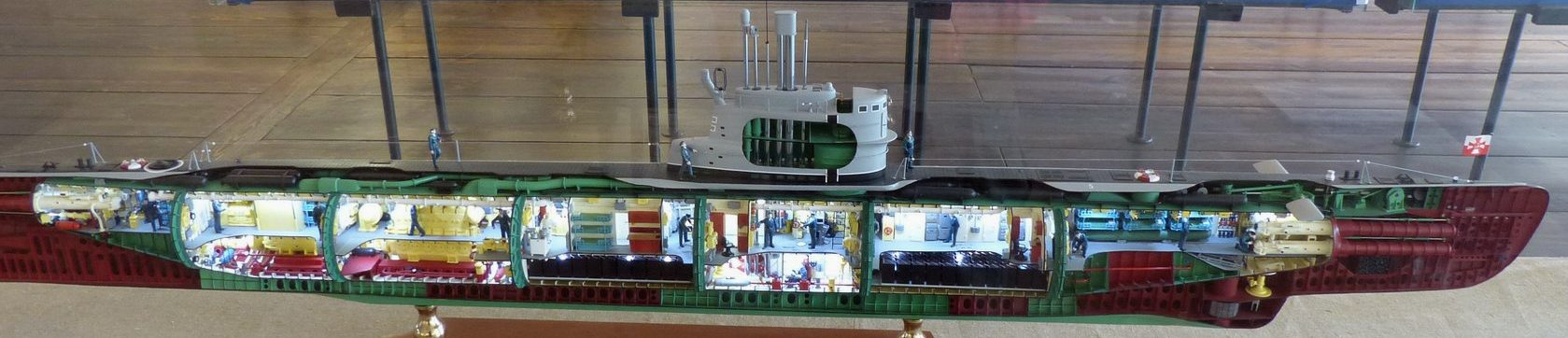 Muzeum Morskie, Gdansk